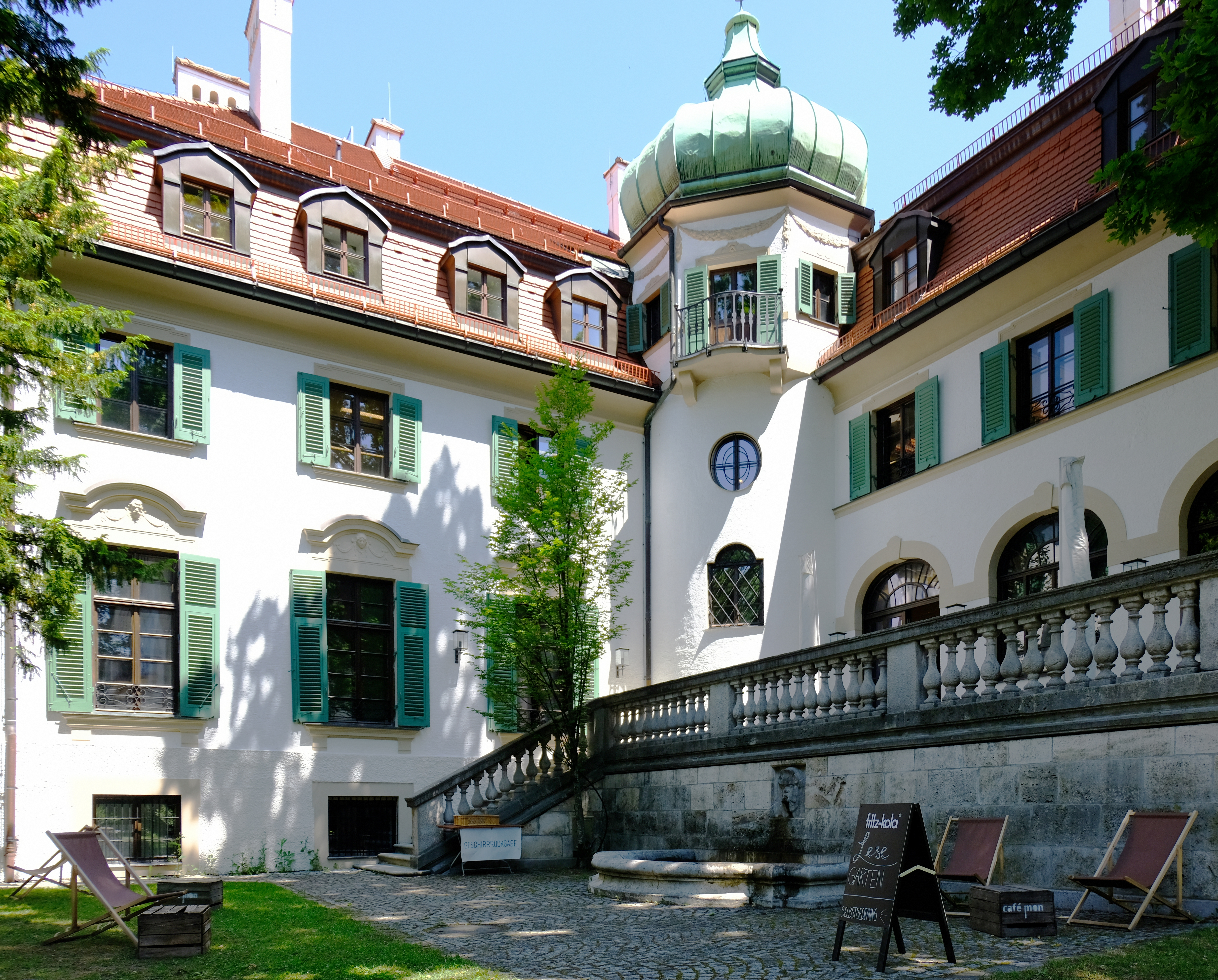 Der Garten der Monacensia im Juni 2019, rectified